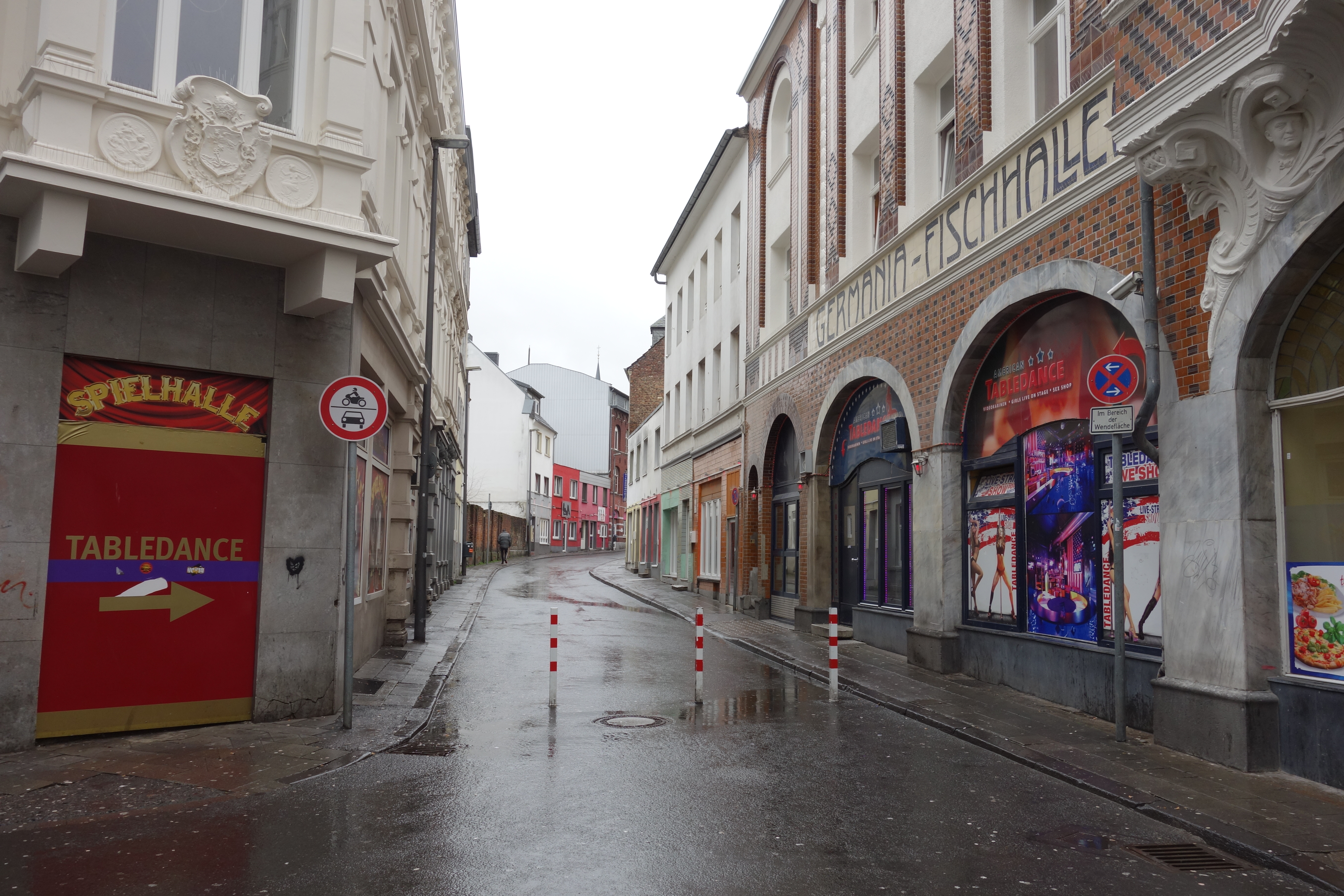 Blick in die Antoniusstraße, Aachen, von Nordosten (Mefferdatisstraße) aus